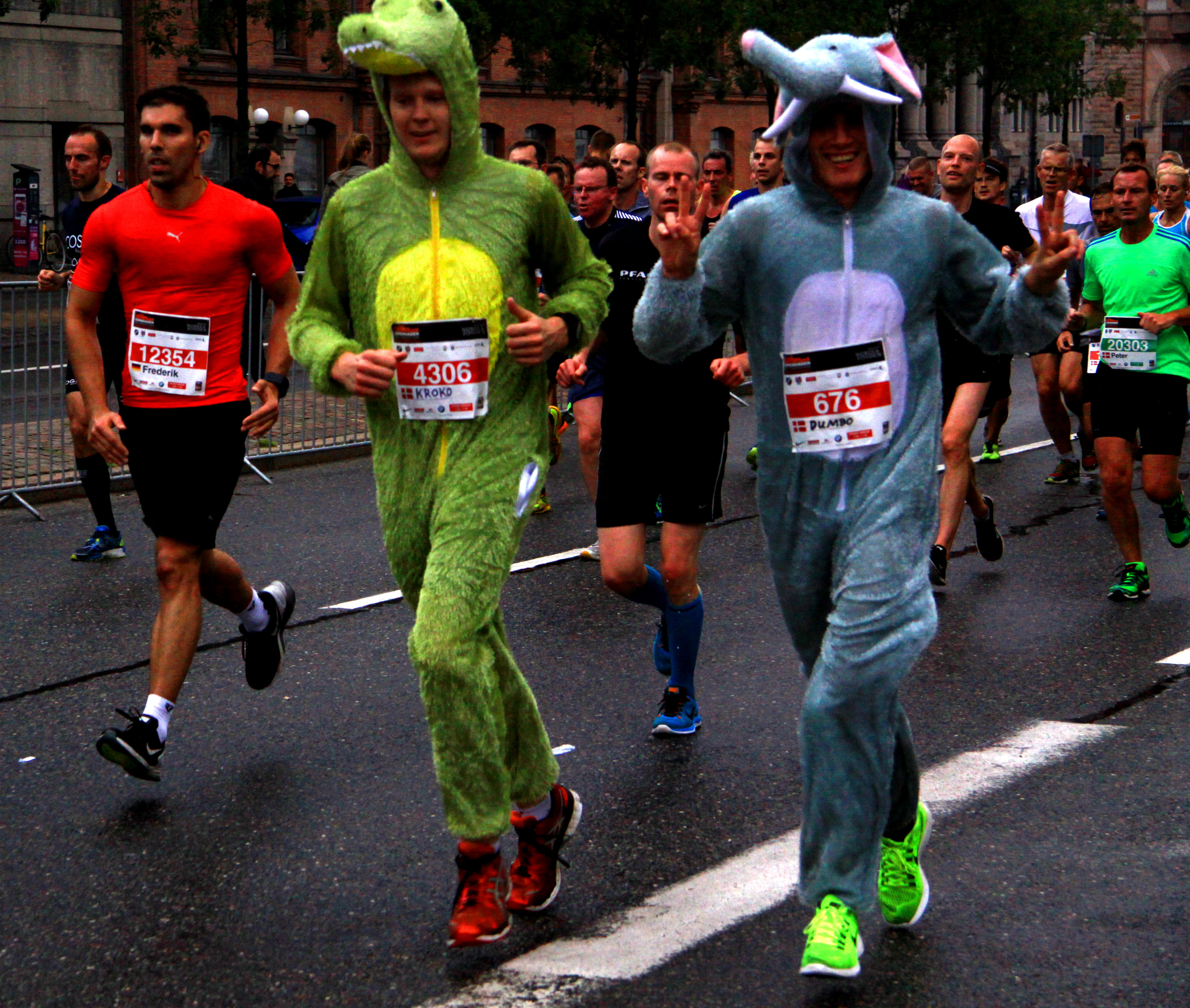 Købnehavn / Copenhagen. Halvmarathon i byen.